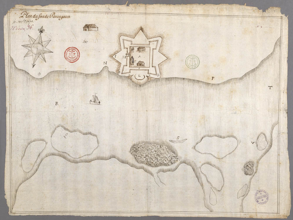 Iconographie représentant le fort de Pentagouet situé en Acadie en 1670.